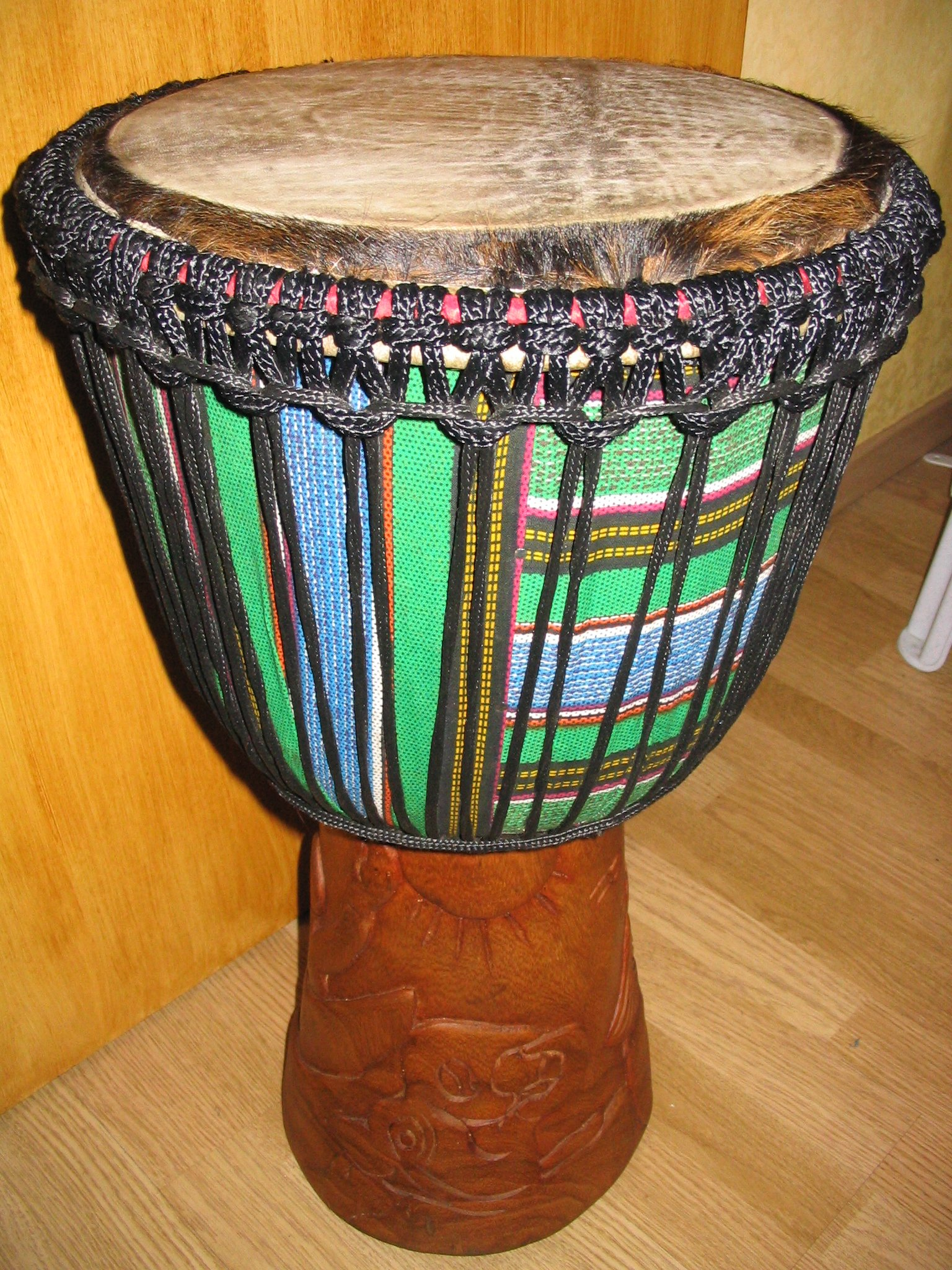 Description: Djembé Source: Jérôme Paniel (Moi) Licence